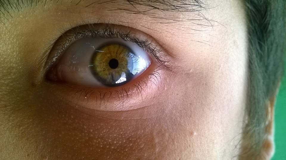 Ojo humano